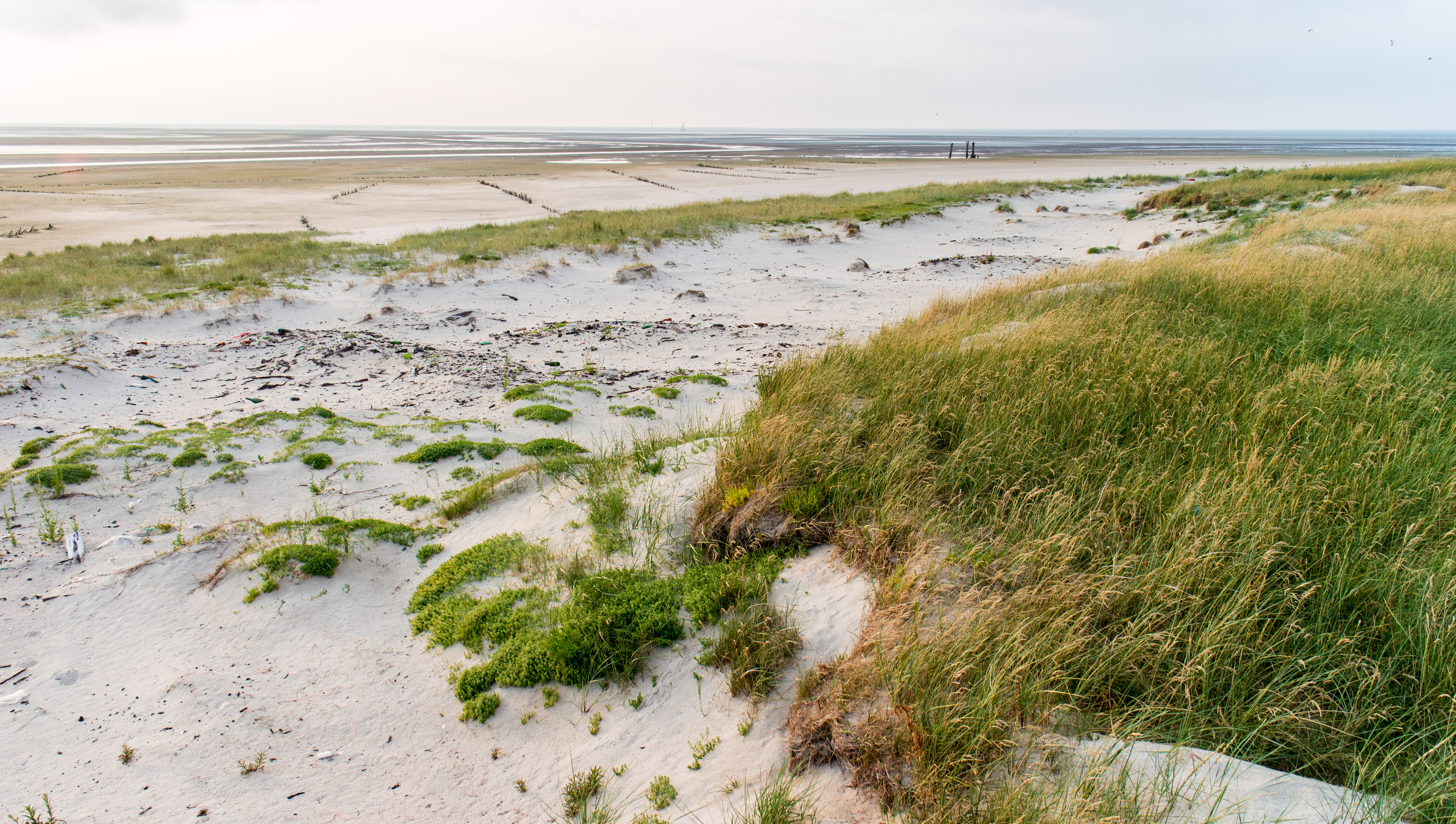 Nordweststrand der Insel Scharhörn. Im Hintergrund die Pfähle der Hütte von 1957, die 2014 schon etwa 125m weit im Watt standen und ca 2m aus dem Boden ragen. zwischen den Dünen wurden alte Müllhalden der Inselbewohner aus den 1950er Jahren durch Errosion freigelegt. Die Linien im Sand sind Reste alter Sandfangzäune aus den späten 1980er Jahren.